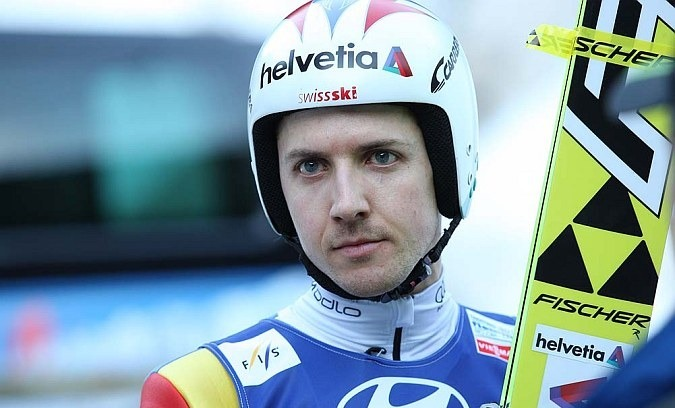 Konkurs drużynowy mężczyzn na skoczni K-120